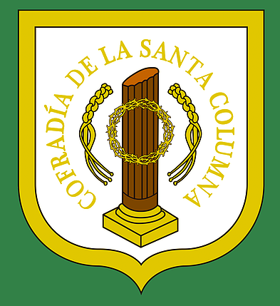 Escudo de la Cofradía sobre fondo verde, el cual es el color del habito de la cofradía.